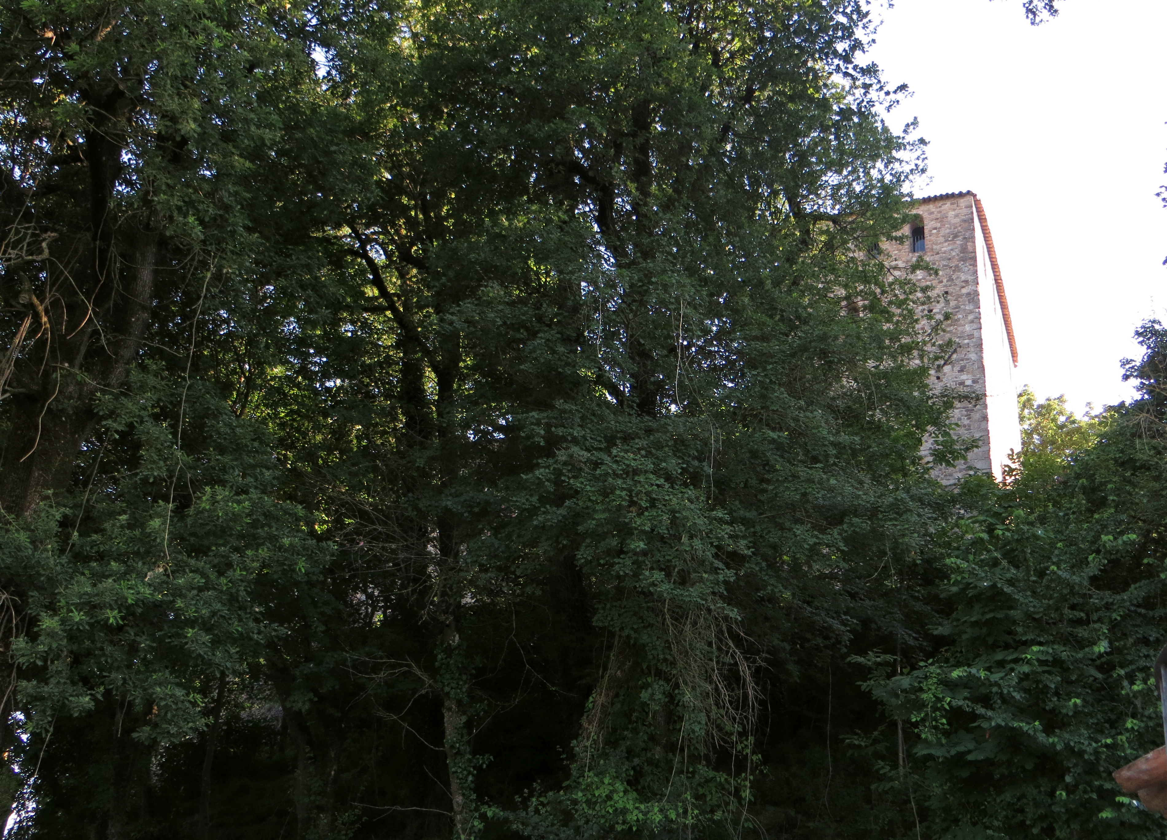 Castello di Guardasone (Traversetolo) - mastio